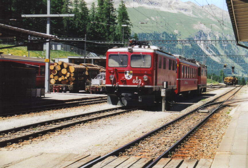 RhB Ge 4/4 I 602 (dahinter eine Ge 4/4 II) am de:22. Juni de:2003 in Pontresina. Steffen Mokosch